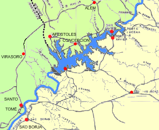 MAPA DE LA FUTURA REPRESA GARABI